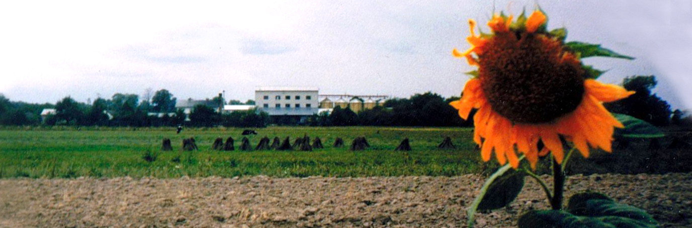 Tarnogród, Poland Agrary landscape / Pejzaż rolniczy